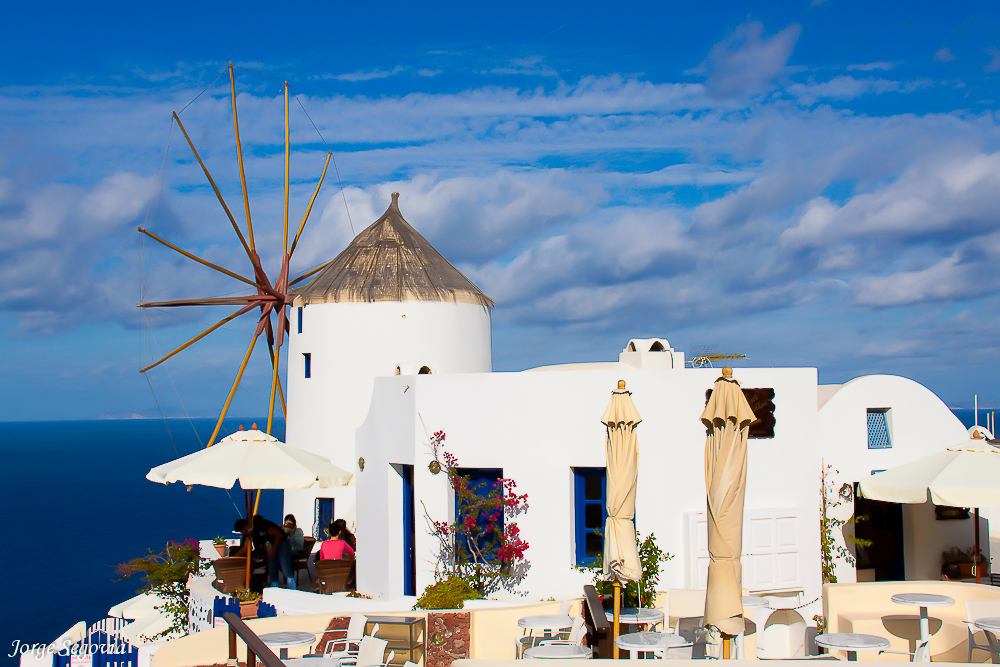 Isla de Santorini en Grecia